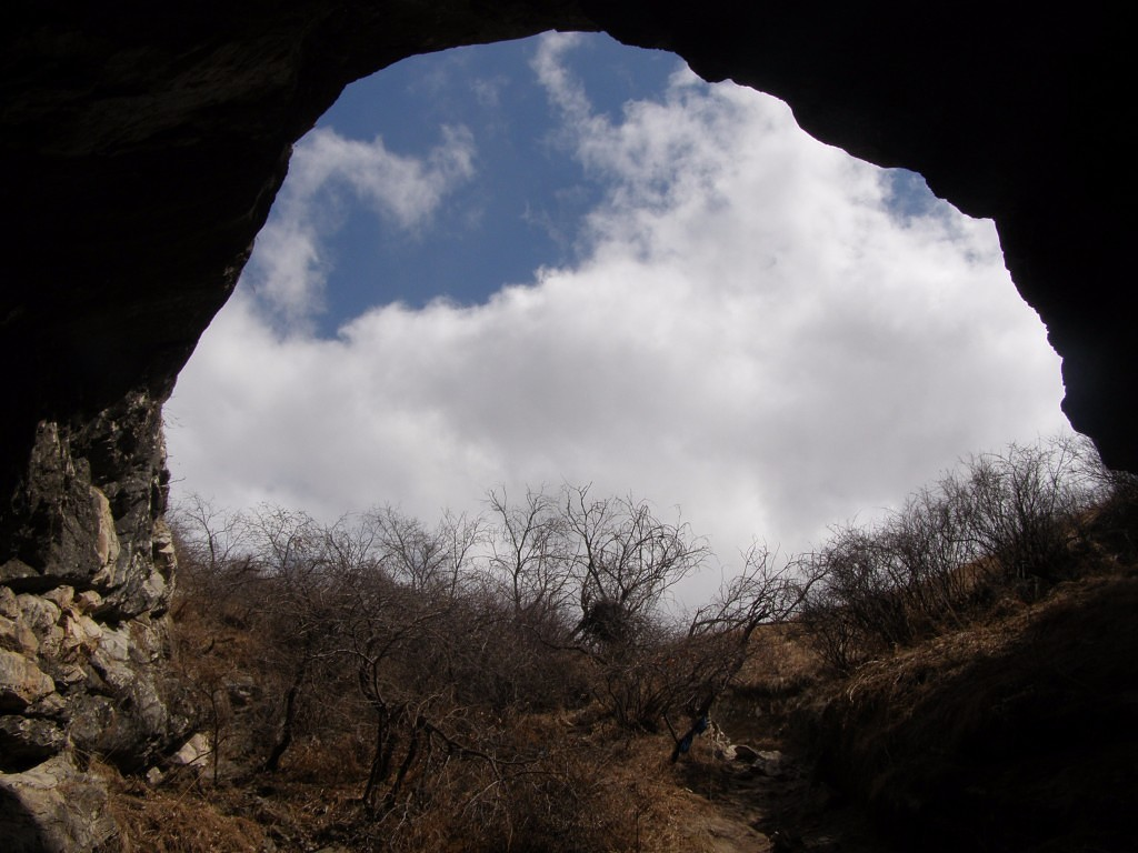 Пещеры Хээтэй, Могойтуйский район This image is related to the protected area of Russia number 7510091